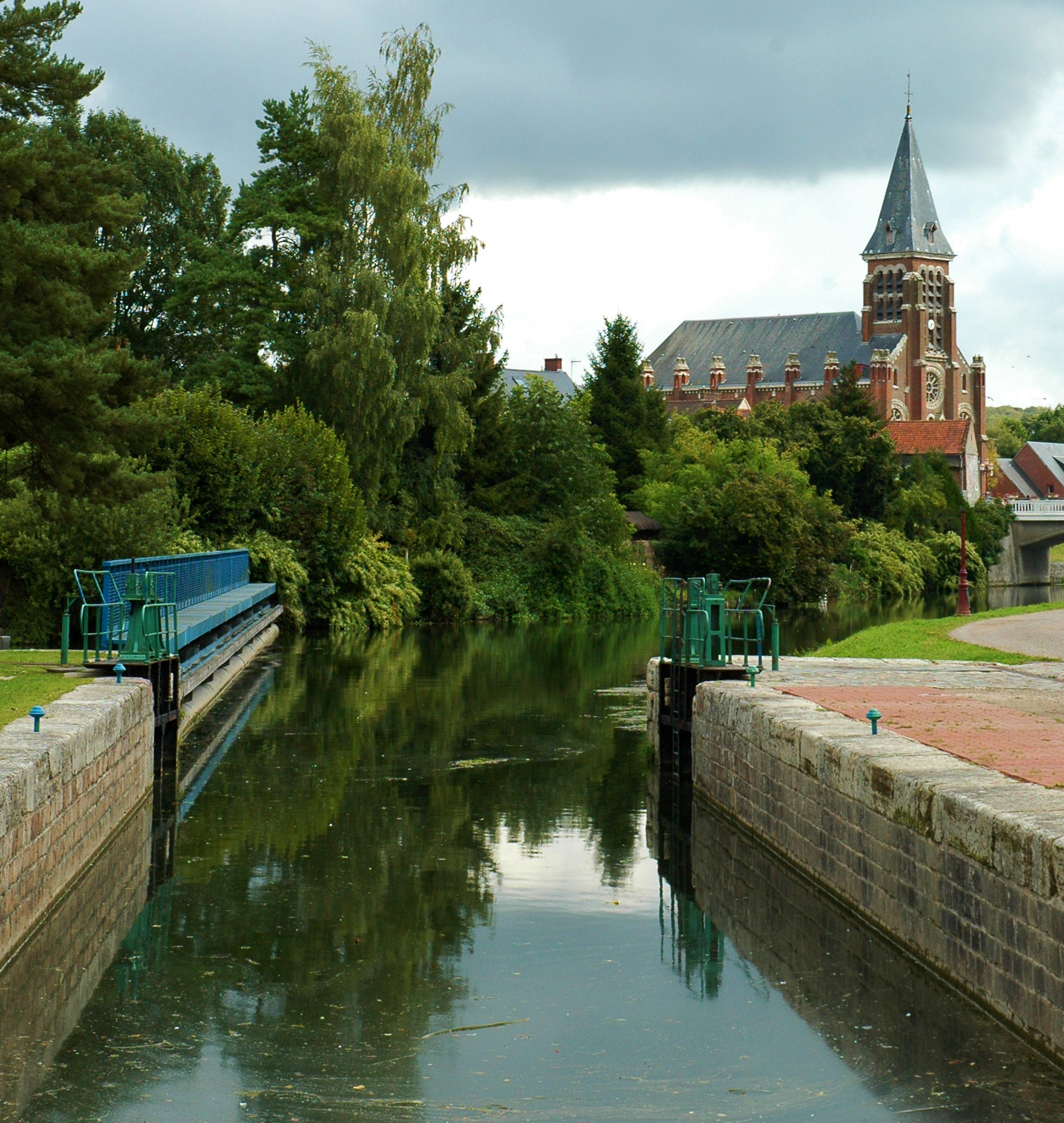 Pont-Rémy (Somme, France). L'église.